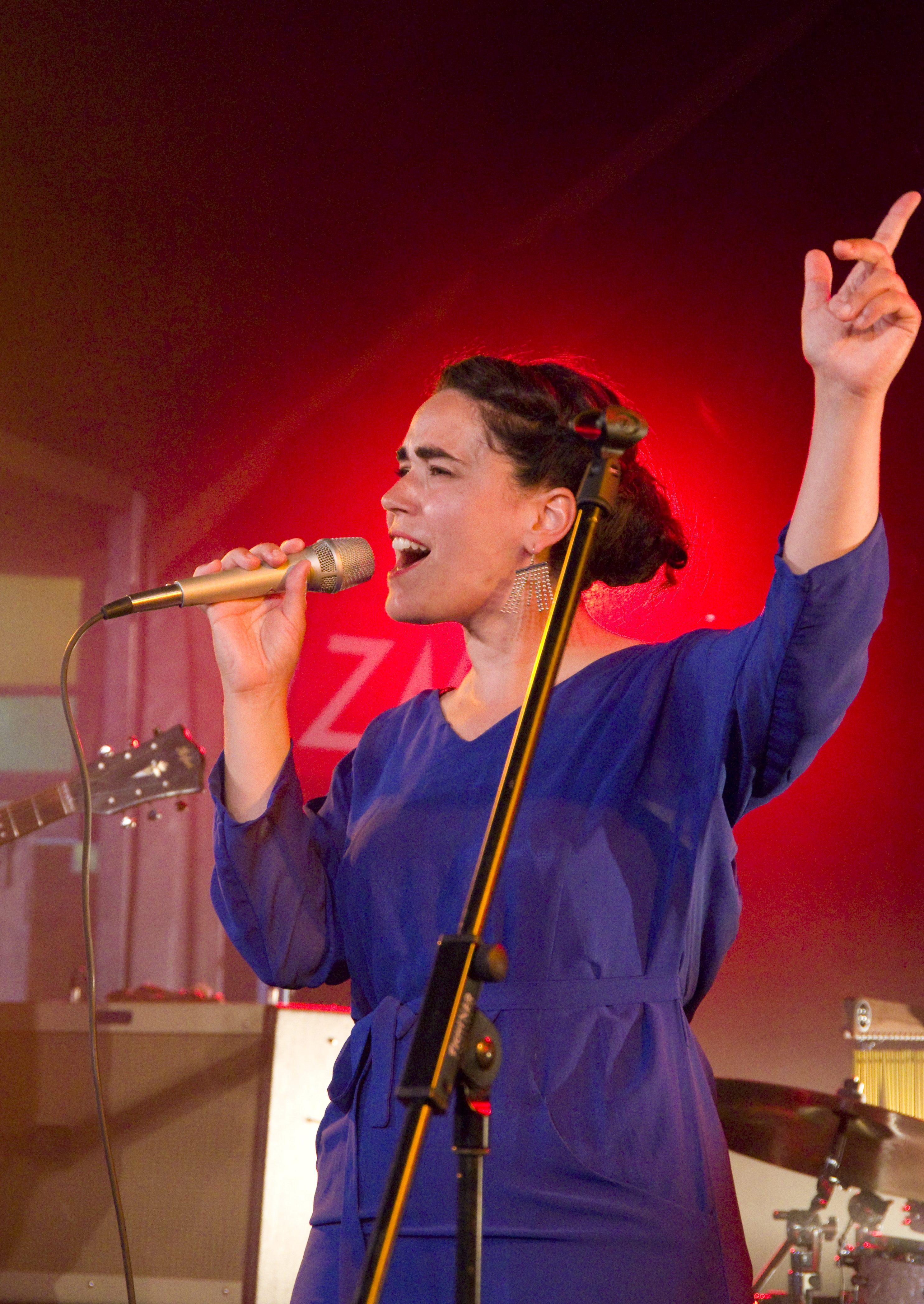 Das Zelt-Musik-Festival 2015 in Freiburg im Breisgau. 13.07.2015 Sarah Ferri